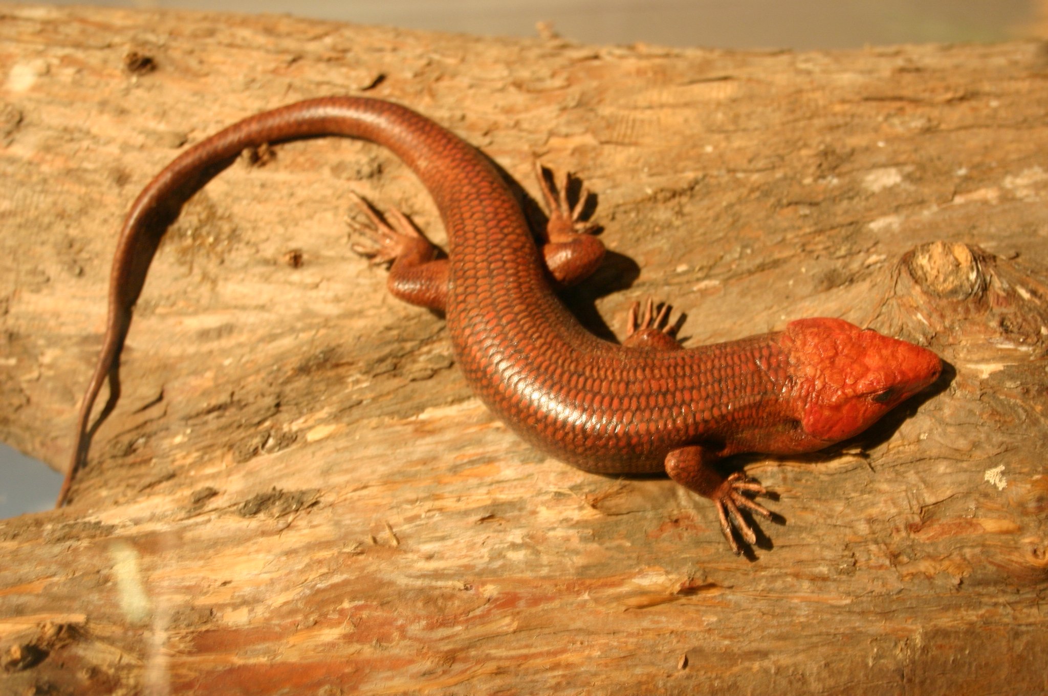 Male Eumeces laticeps